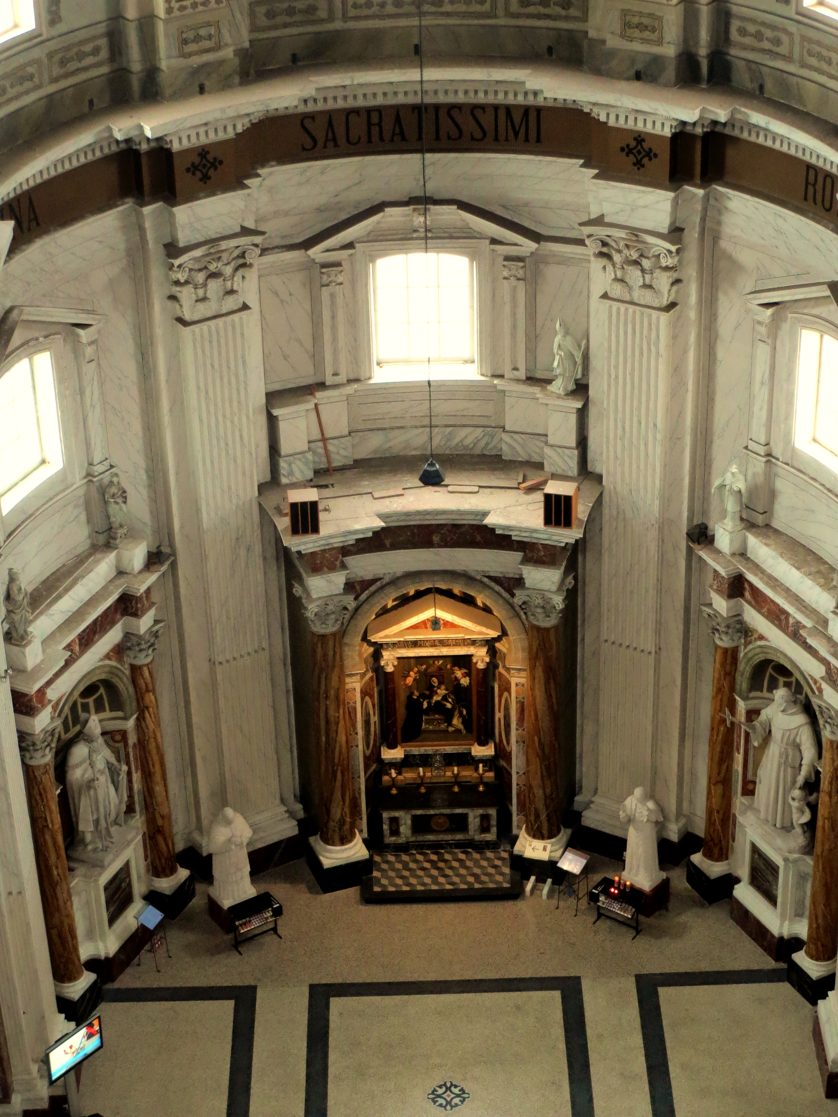 Oudenbosch Basilica westelijke kapel